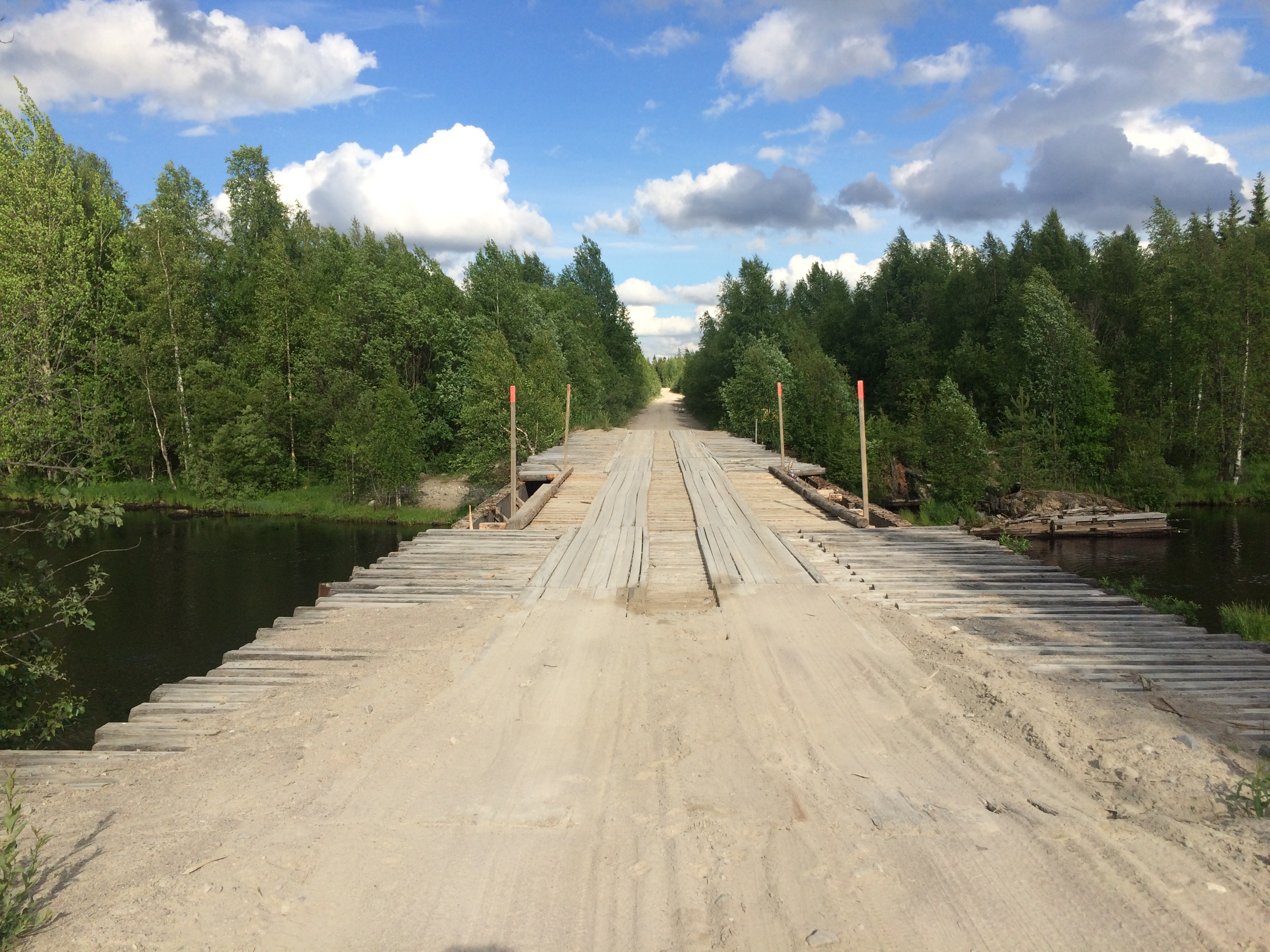 Вожма (река, впадает в Выгозеро)